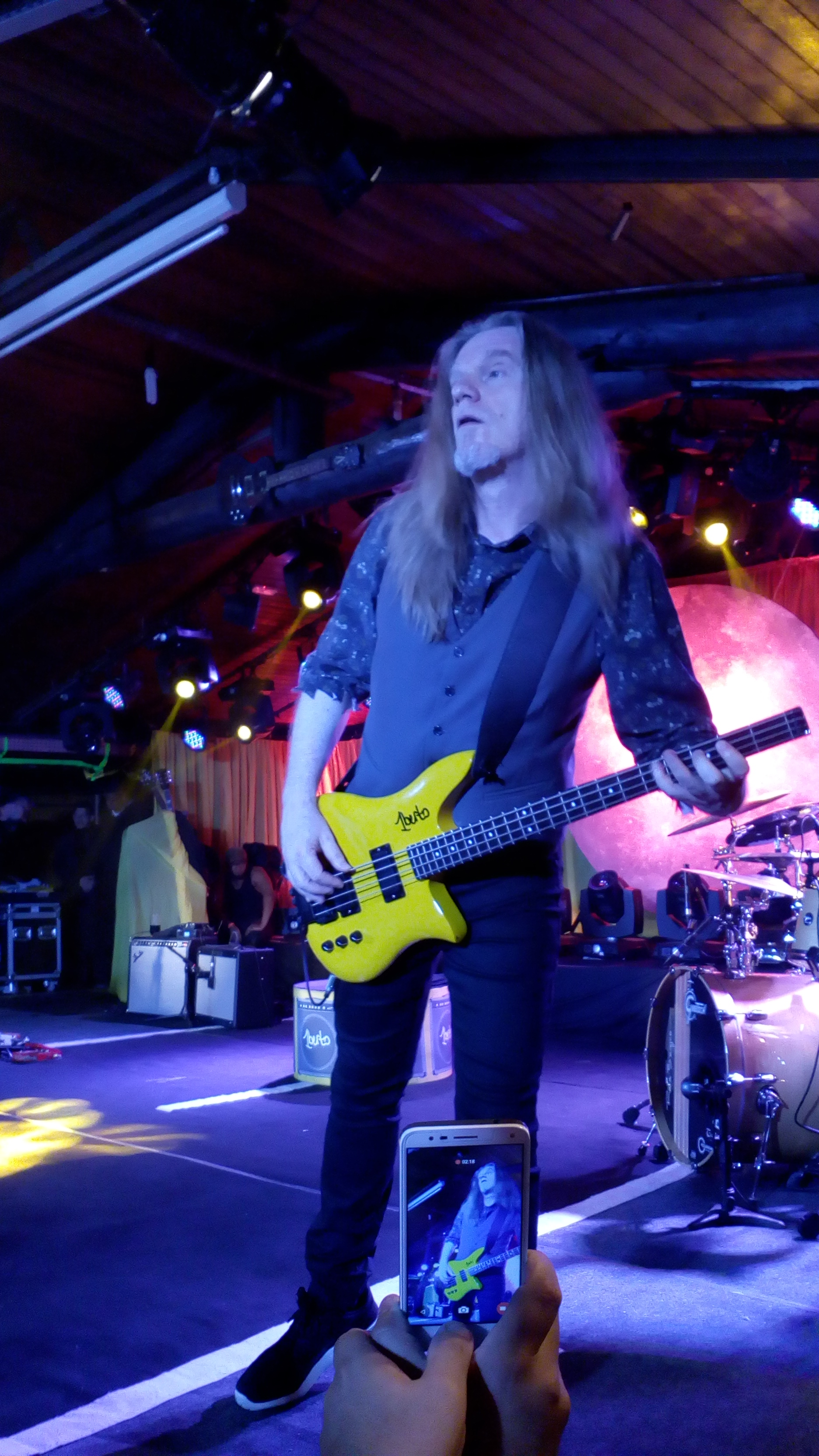 Foto tirada em 22 de outubro de 2017 durante show final da turne "30 anos de A Revolta dos Dandis"